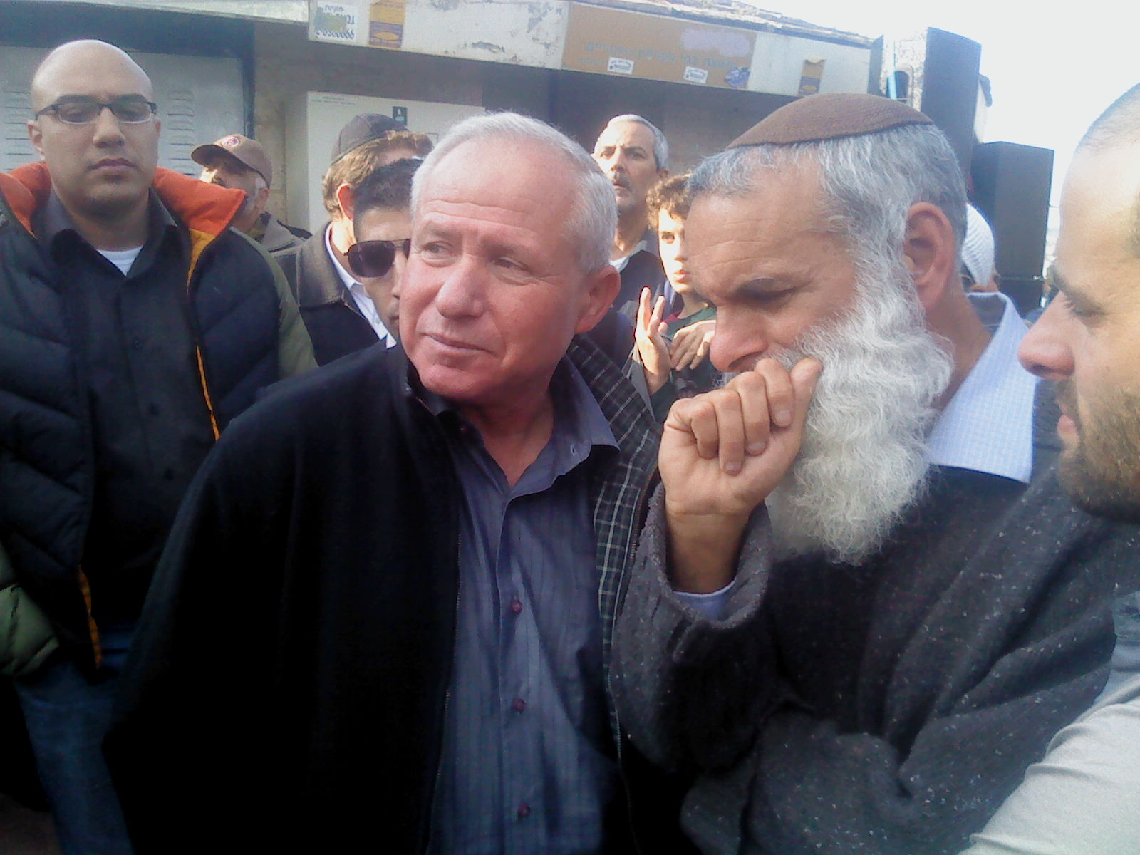 he:אבי דיכטר והרב he:אבי רונצקי בהלווית משפחת פוגל שנרצחו בפיגוע באיתמר, he:13 במרץ he:2011